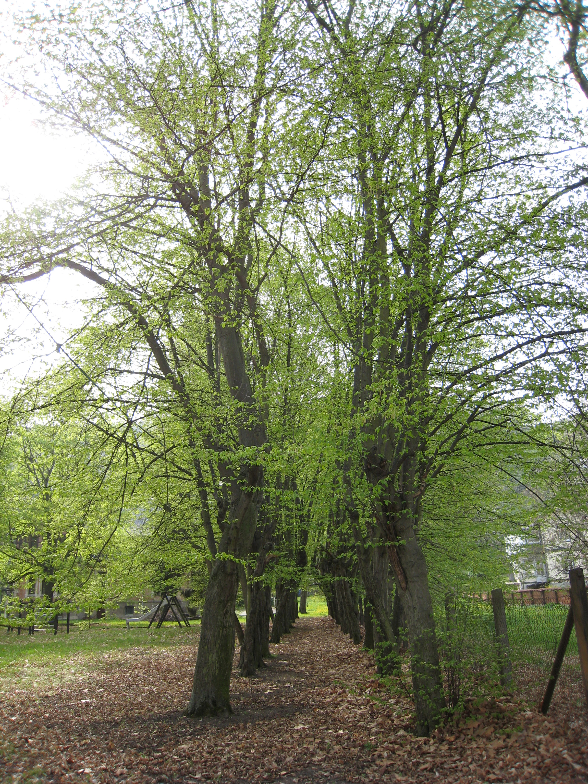 Allee im Villengarten Franz, Plauesche Straße, Arnstadt